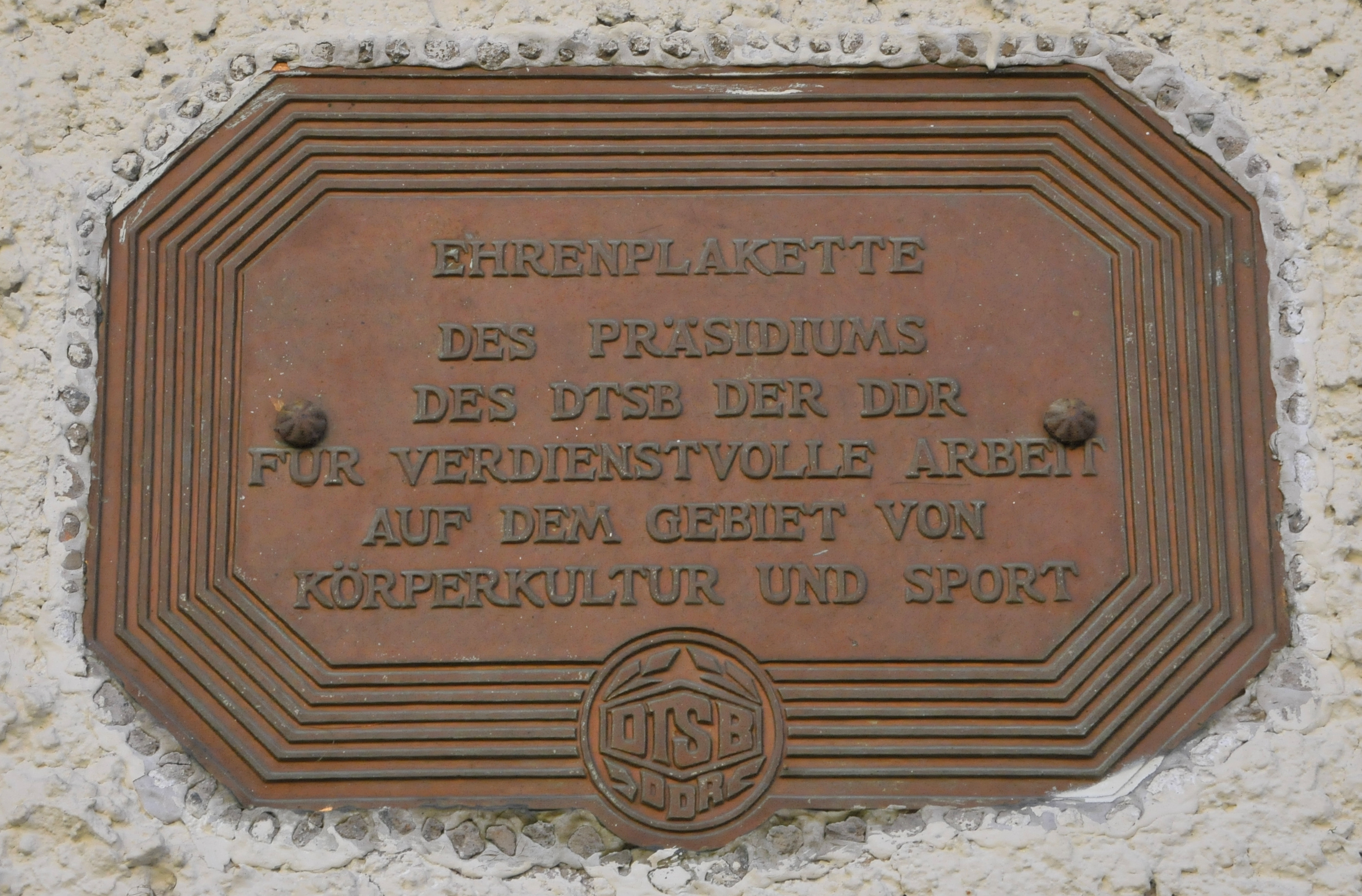 DTSB-Plakette